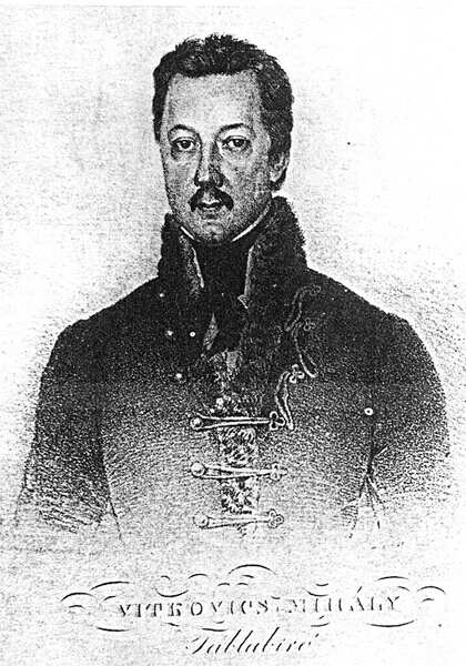 Mihály Vitkovics, Serbian-Hungarian poet, translator